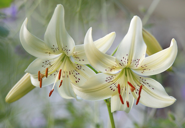 Лилия 'Sweet Surrender'. Россия. Владимирская область.